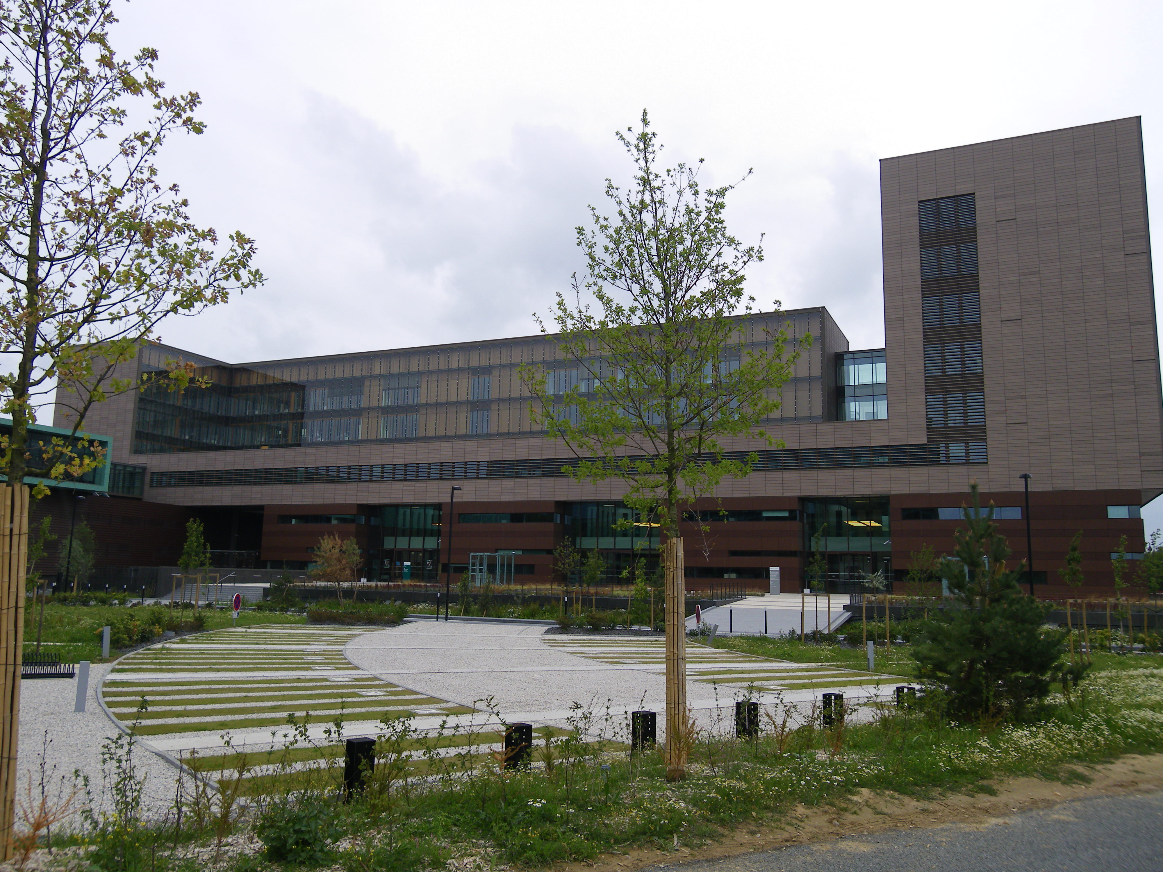 le siege du credit agricole a la courrouze